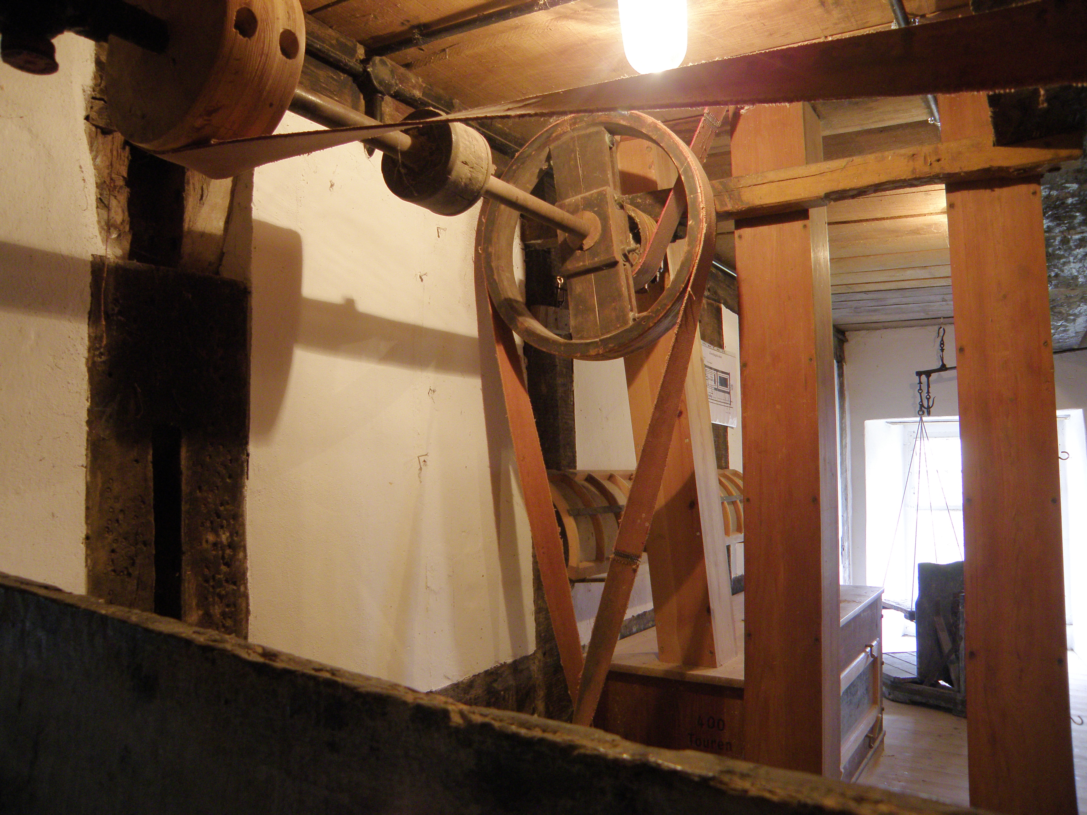 Der Transmissionsriemen zum Antrieb des Sichters.